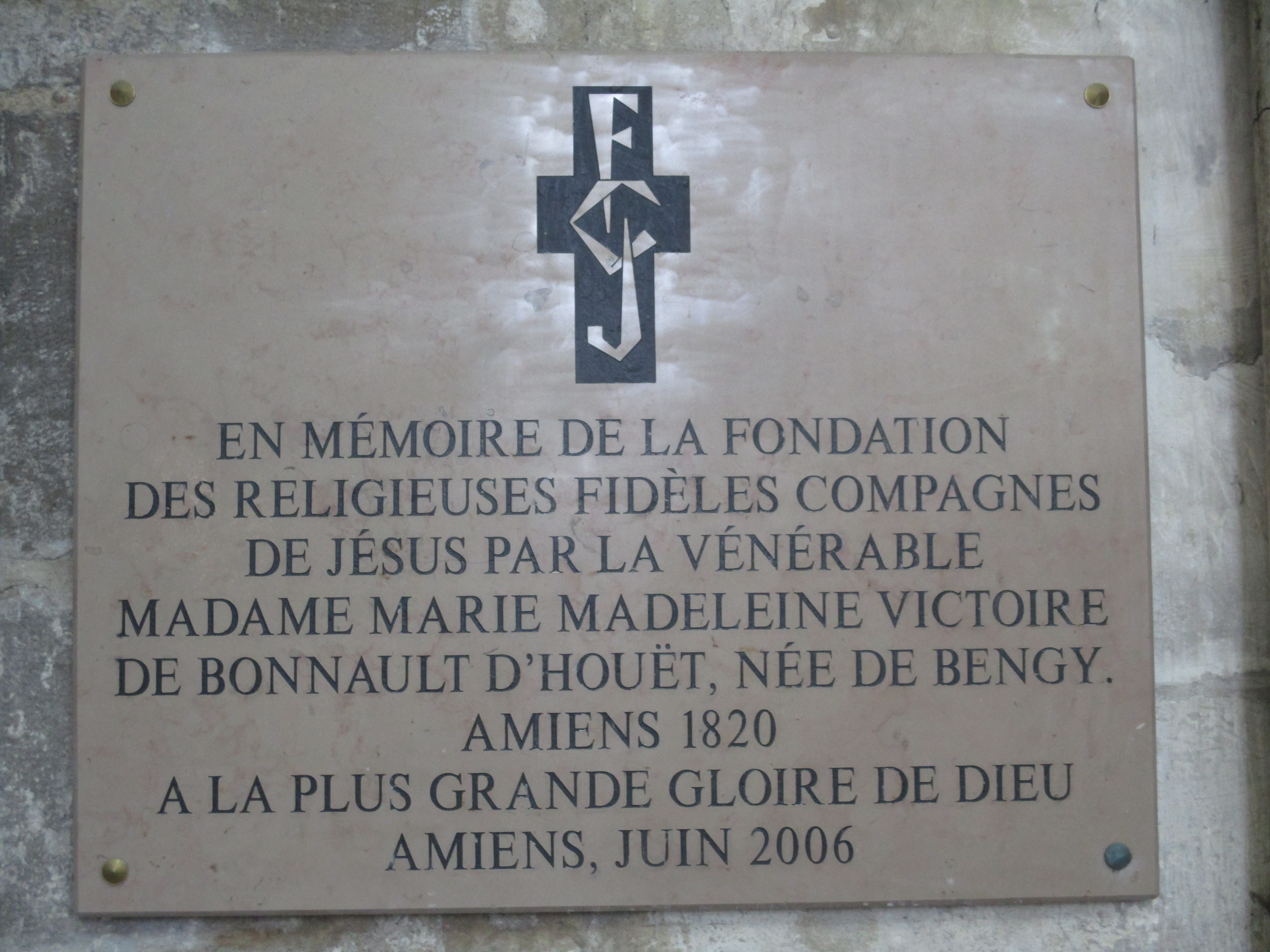 Plaque en l'honneur de la vénérable fondatrice des Compagnes de Jésus (1781-1858). Cathédrale d'Amiens.